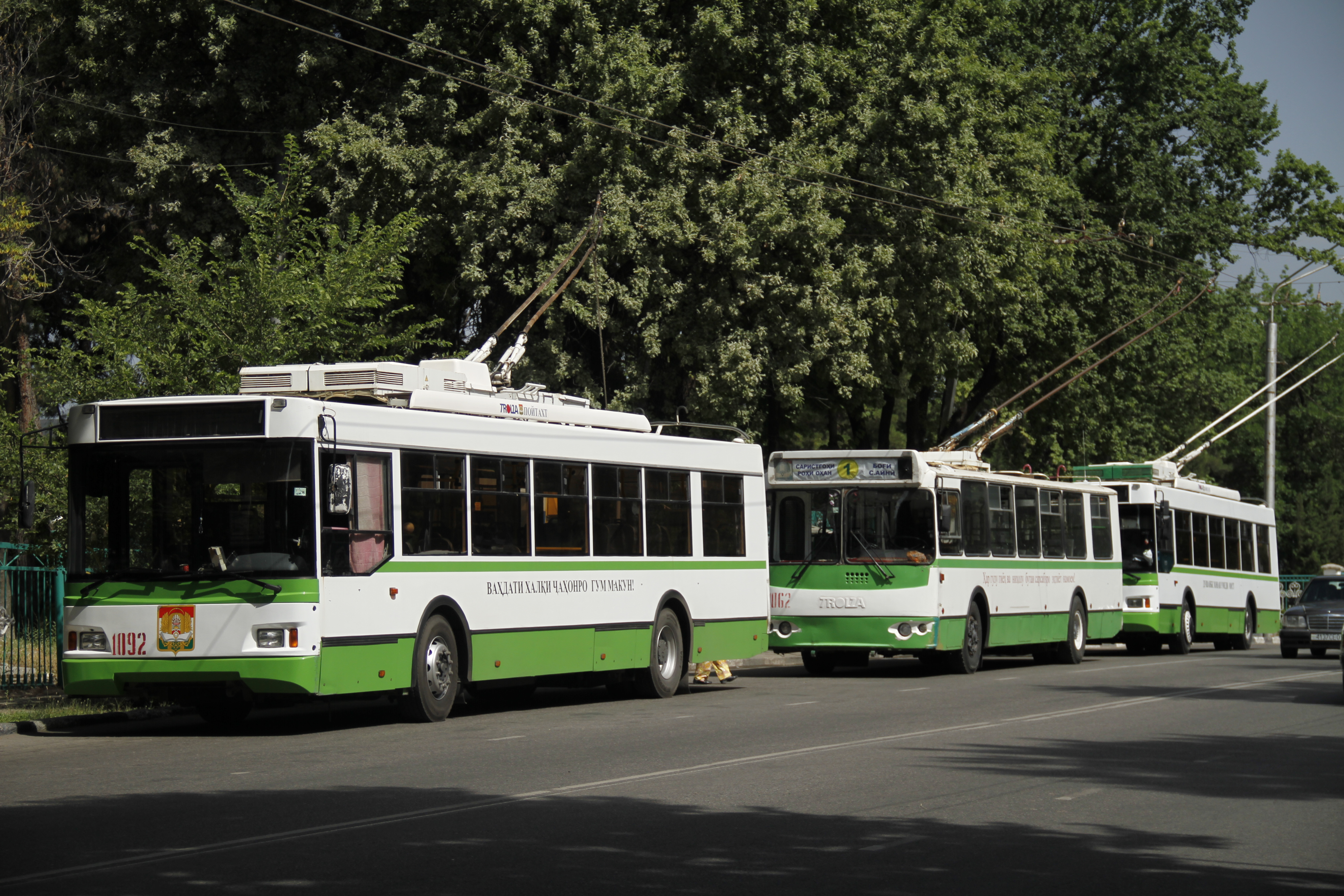 Тоҷикӣ: Троллейбус (шаҳри Душанбе)